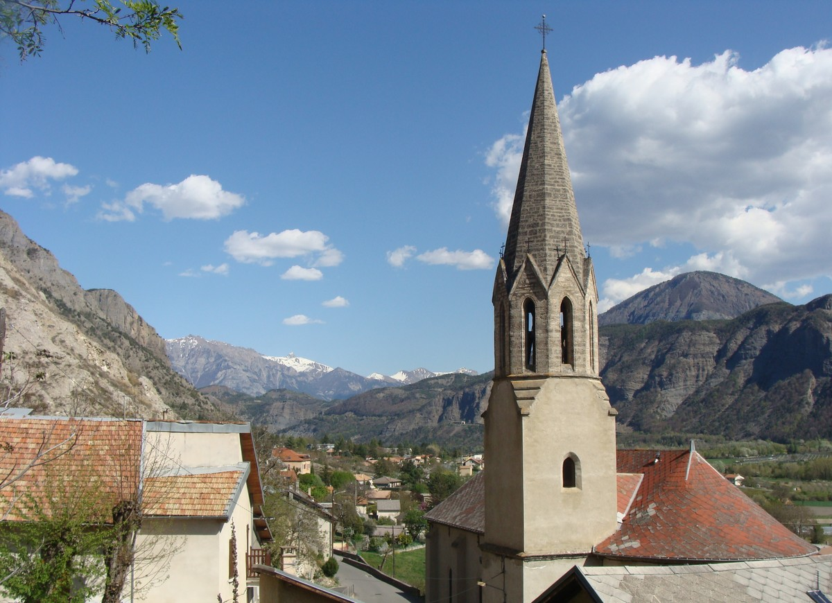 L'église et le village d'Espinasses (Hautes-Alpes). Au fond le massif des Ecrins.